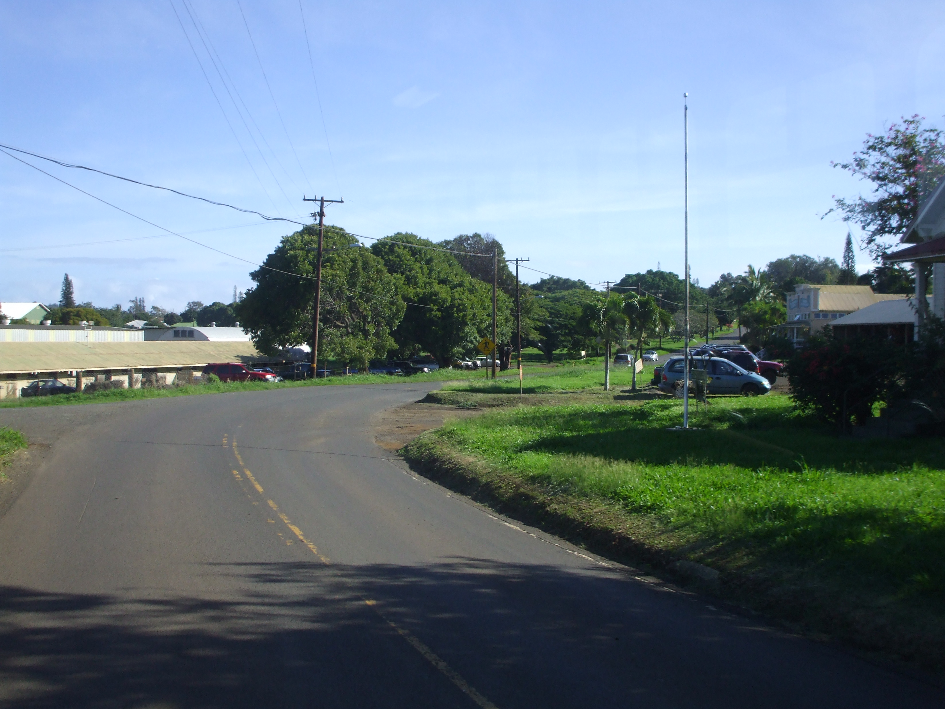 Haliimaile turn.